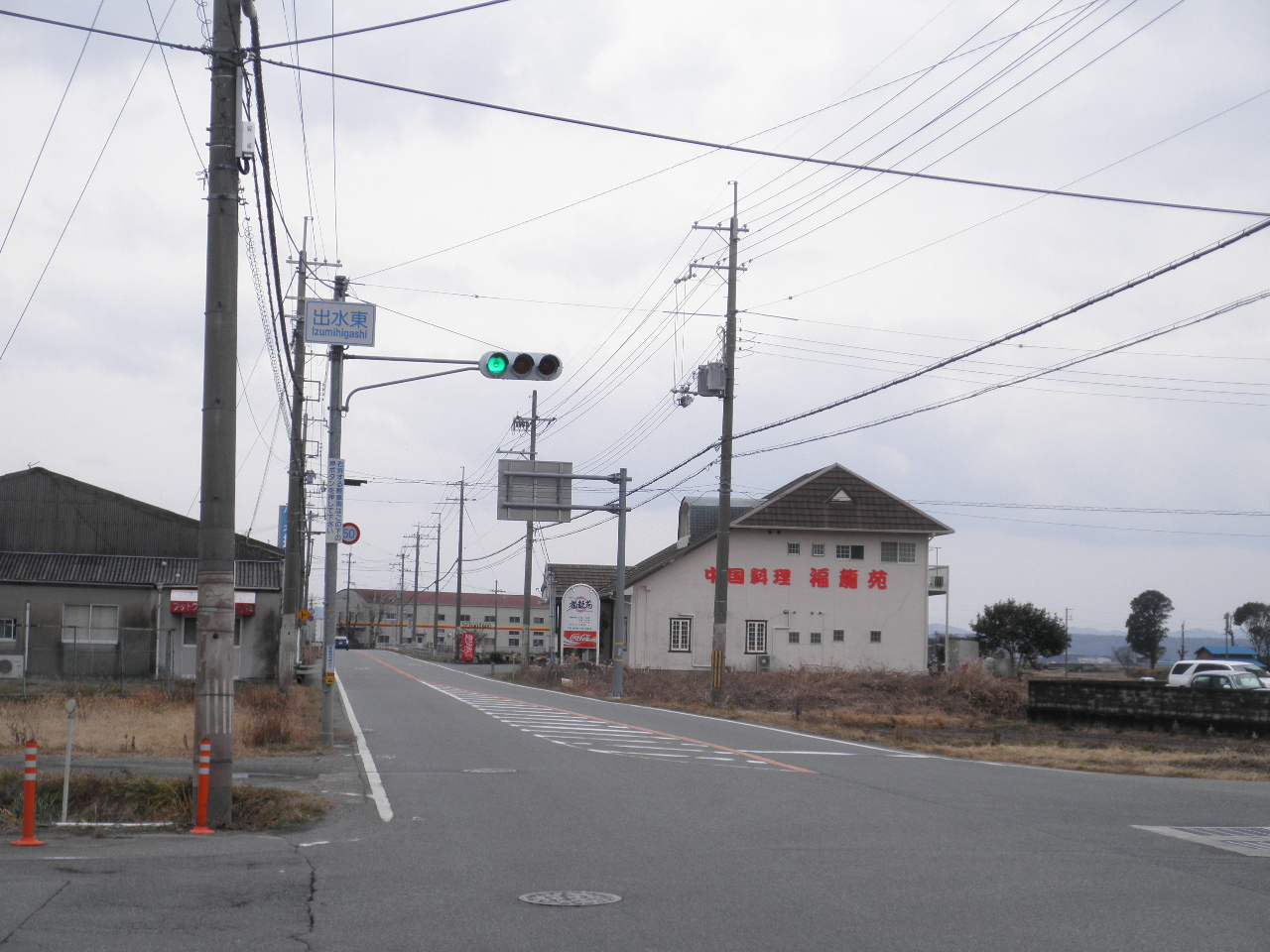 兵庫県加東市出水 兵庫県道567号東古瀬穂積線